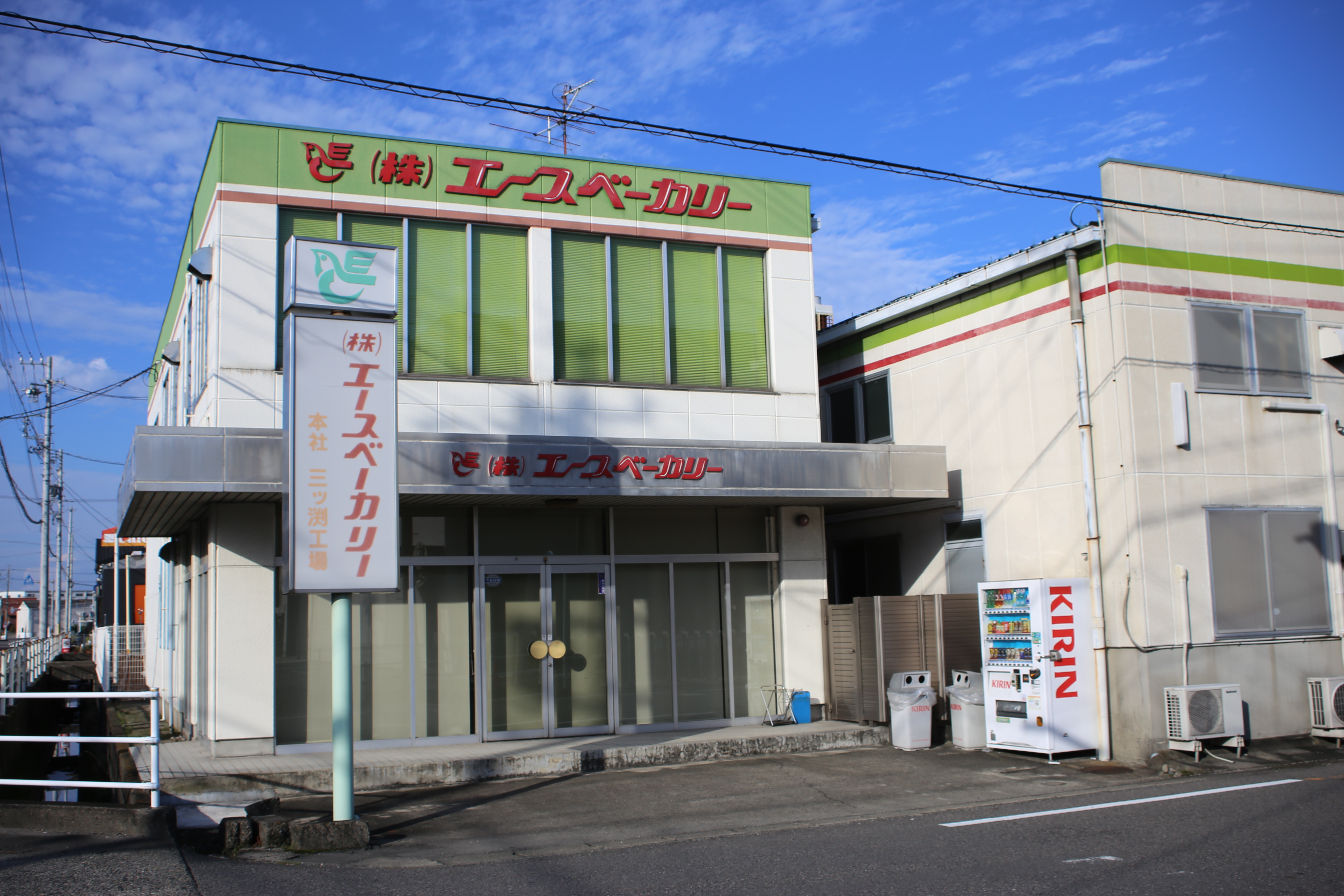 愛知県小牧市のエースベーカリー本社